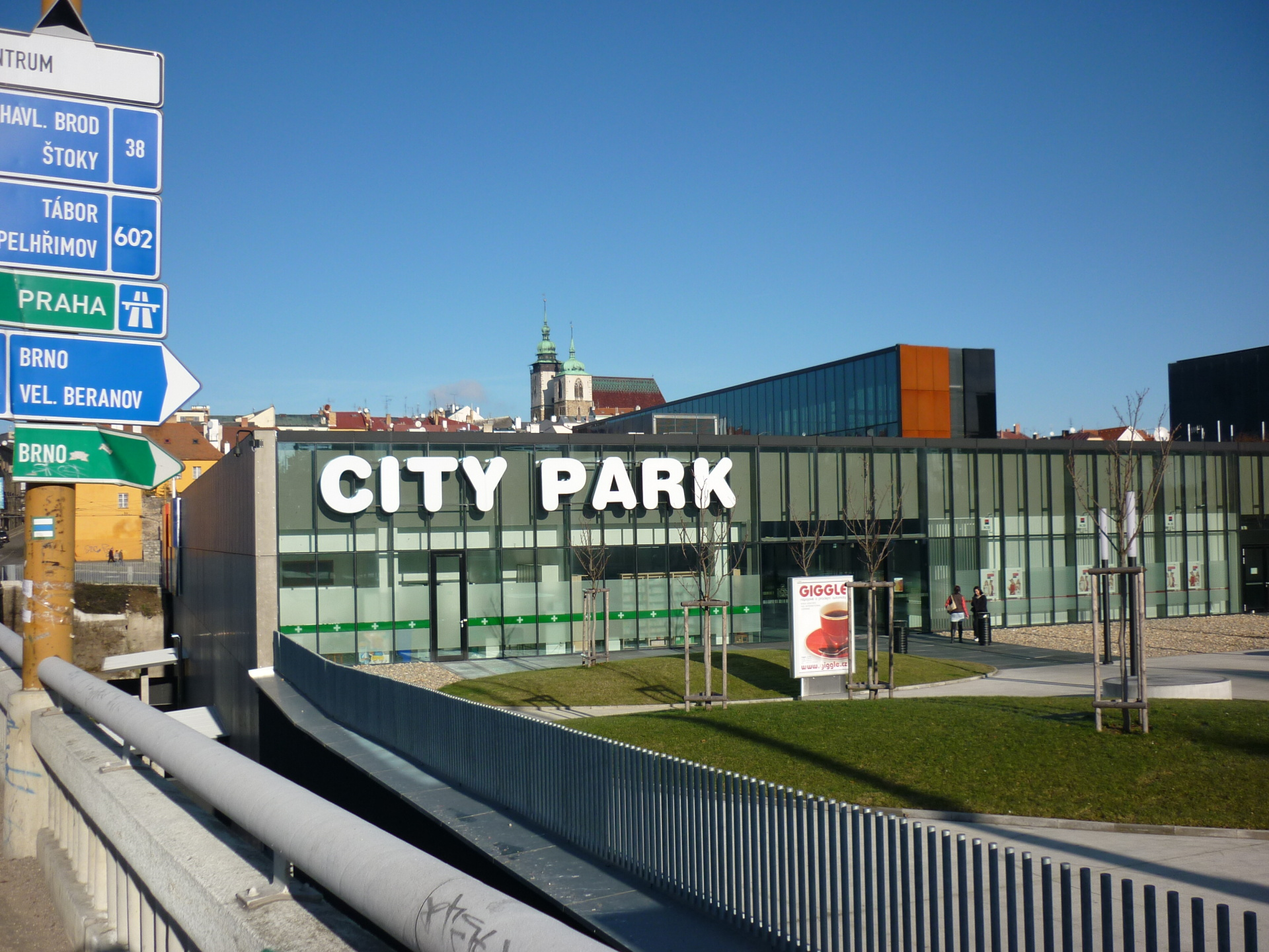 Obchodní centrum v Jihlavě